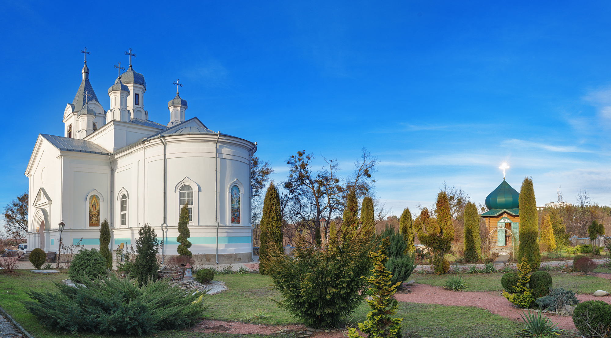 Спасо-Преображенський собор Тригірського монастиря (погляд від келій)